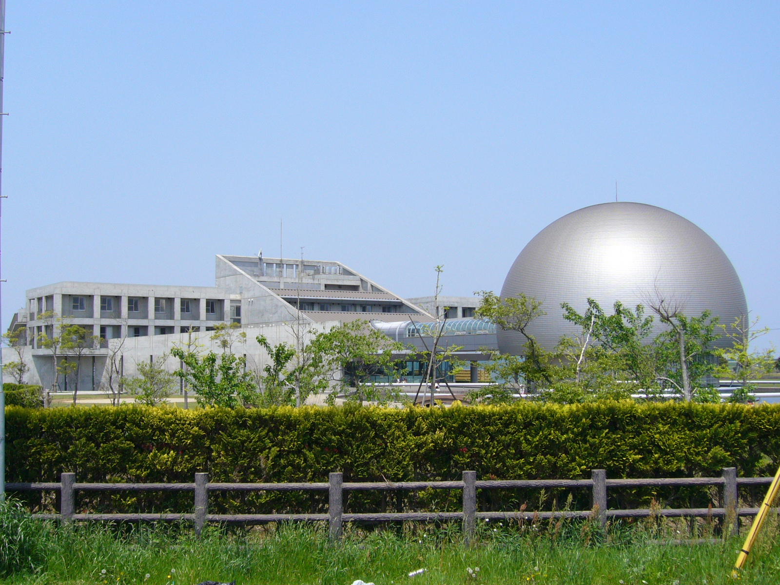 suigou-omigawa-syounen-shizennoie,katori-city,japan